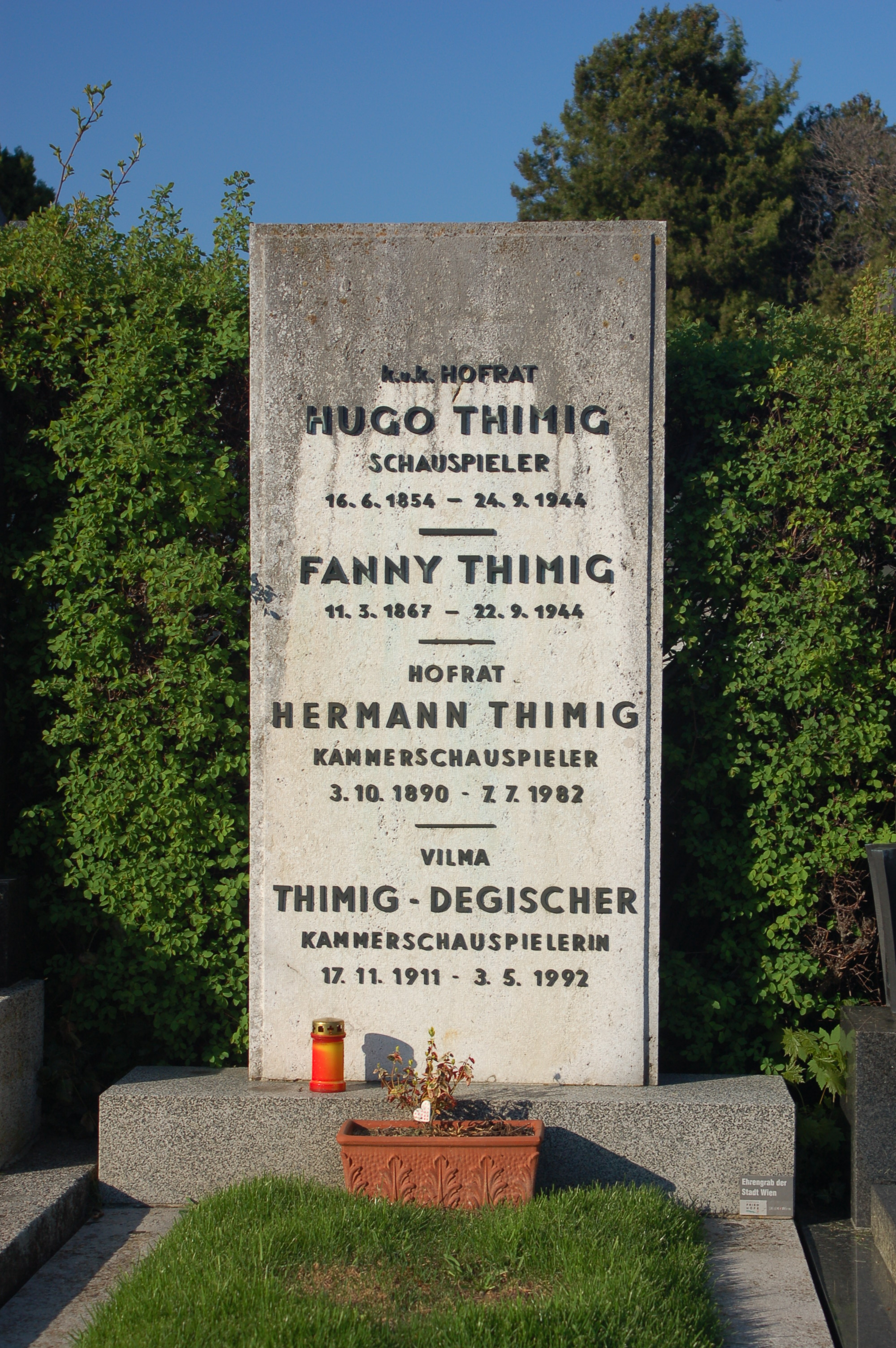 Sieveringer Friedhof, Ehrengrab der Stadt Wien für Hermann Thimig sowie für Hugo Thiming und Vilma Thimig-Degischer